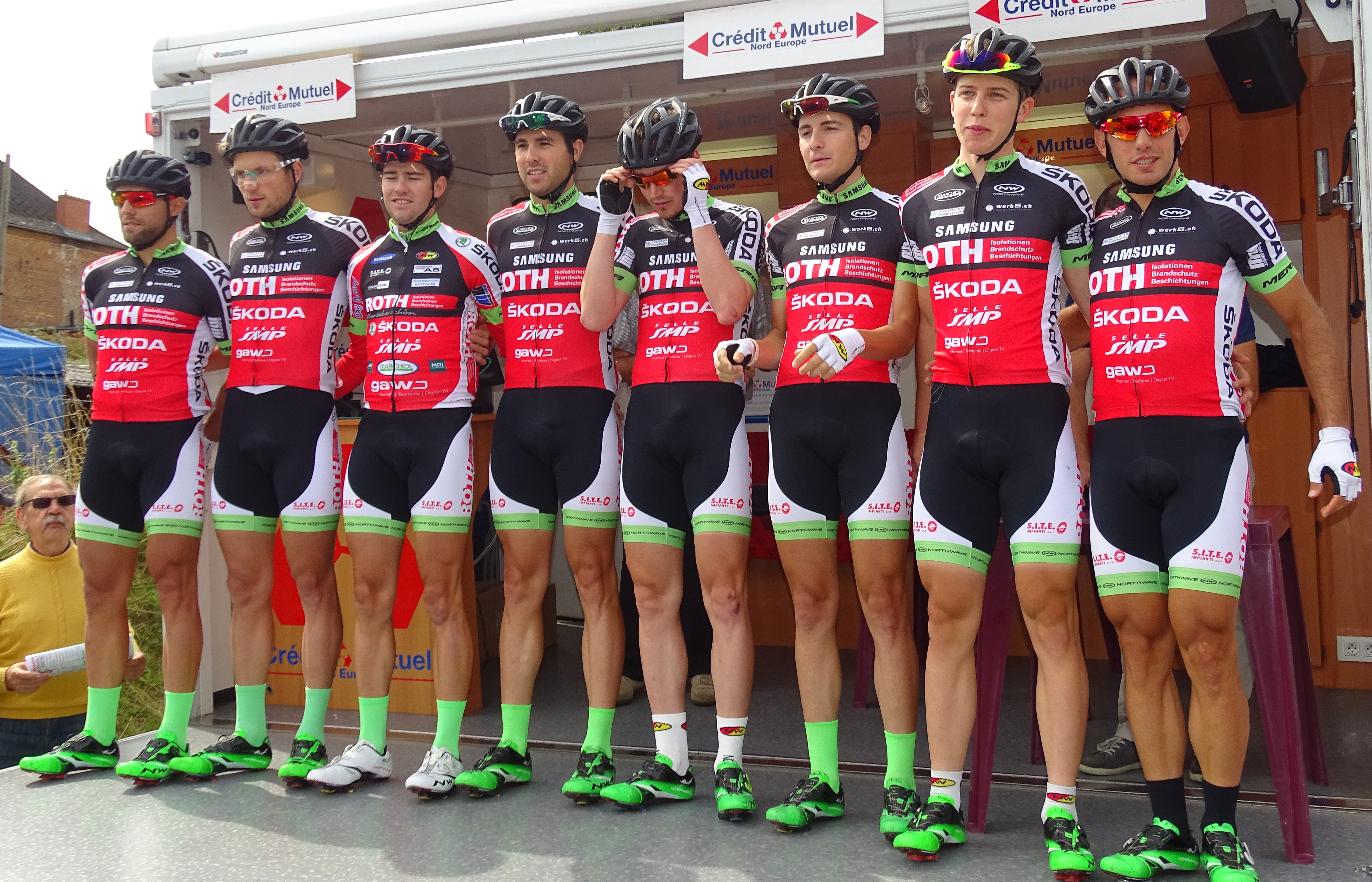 Reportage réalisé le mardi 25 août à l'occasion du départ et de l'arrivée du Grand Prix des Marbriers 2015 à Bellignies, Nord-Pas-de-Calais, France.